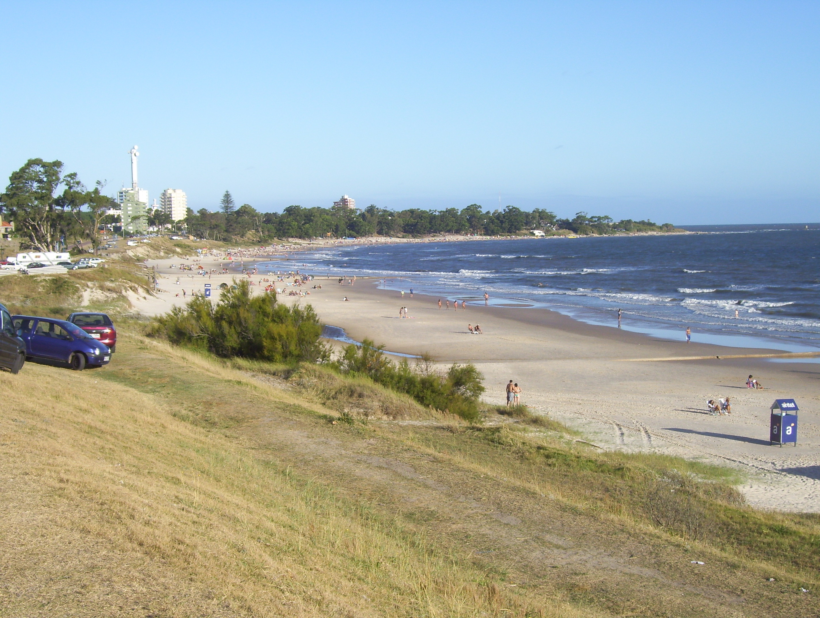 Playa y ciudad de Atlántida